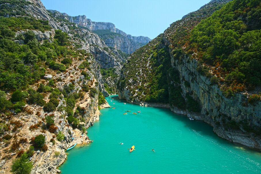 Les gorges du Verdon